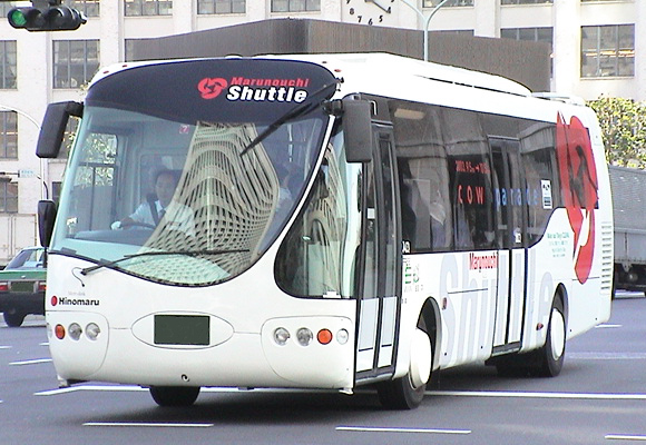 丸ノ内シャトル（日の丸自動車が運行する無料巡回バス）